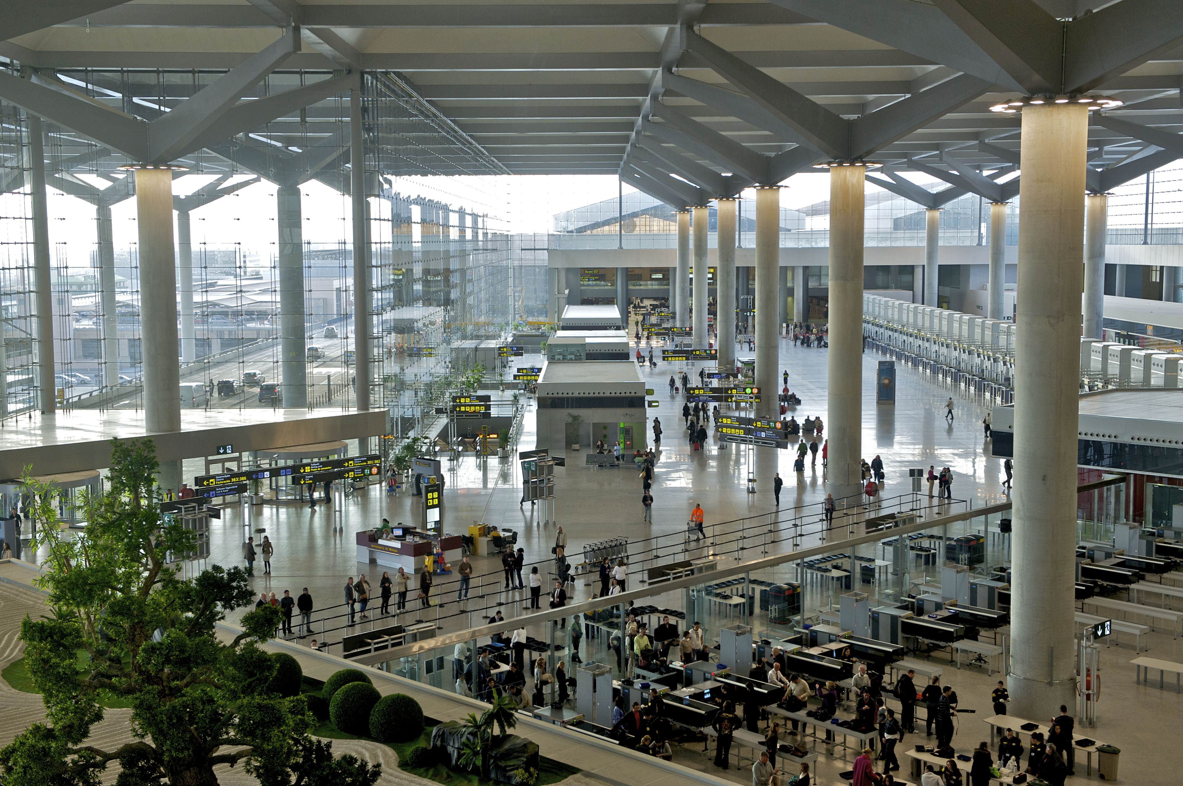 La Terminal 3 del Aeropuerto de Málaga-Costa del Sol